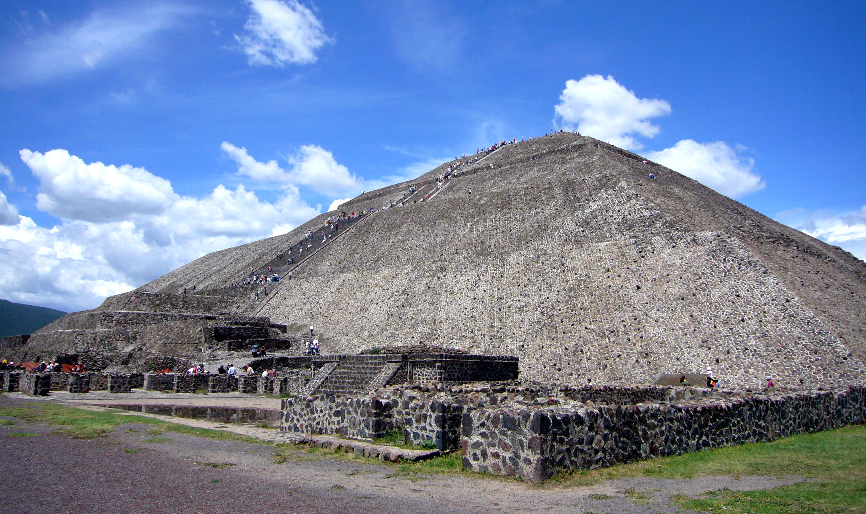 Pirámide del Sol, Teotihuacán, México